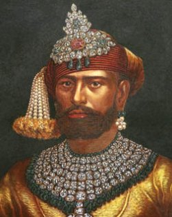 Khande Rao Gaekwad